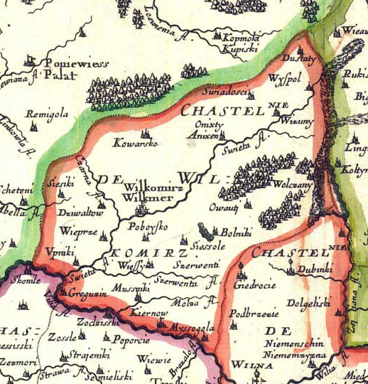 Lietuvos dalies žemėlapis 1665 m. (Vilniaus ir Trakų vaivadijos)